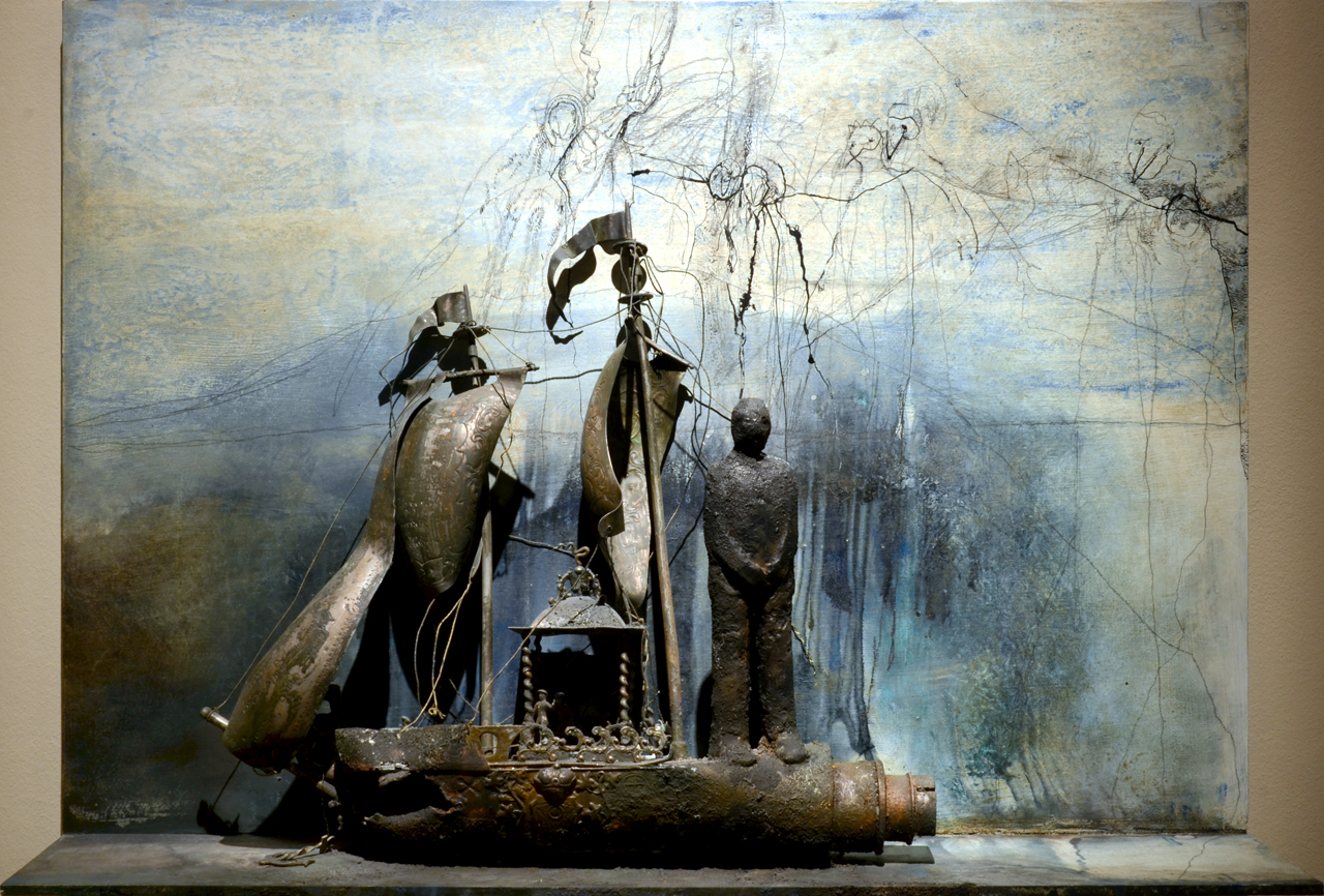 Bedřich Dlouhý, Pocta sobě VII. (2014), kombinovaná technika